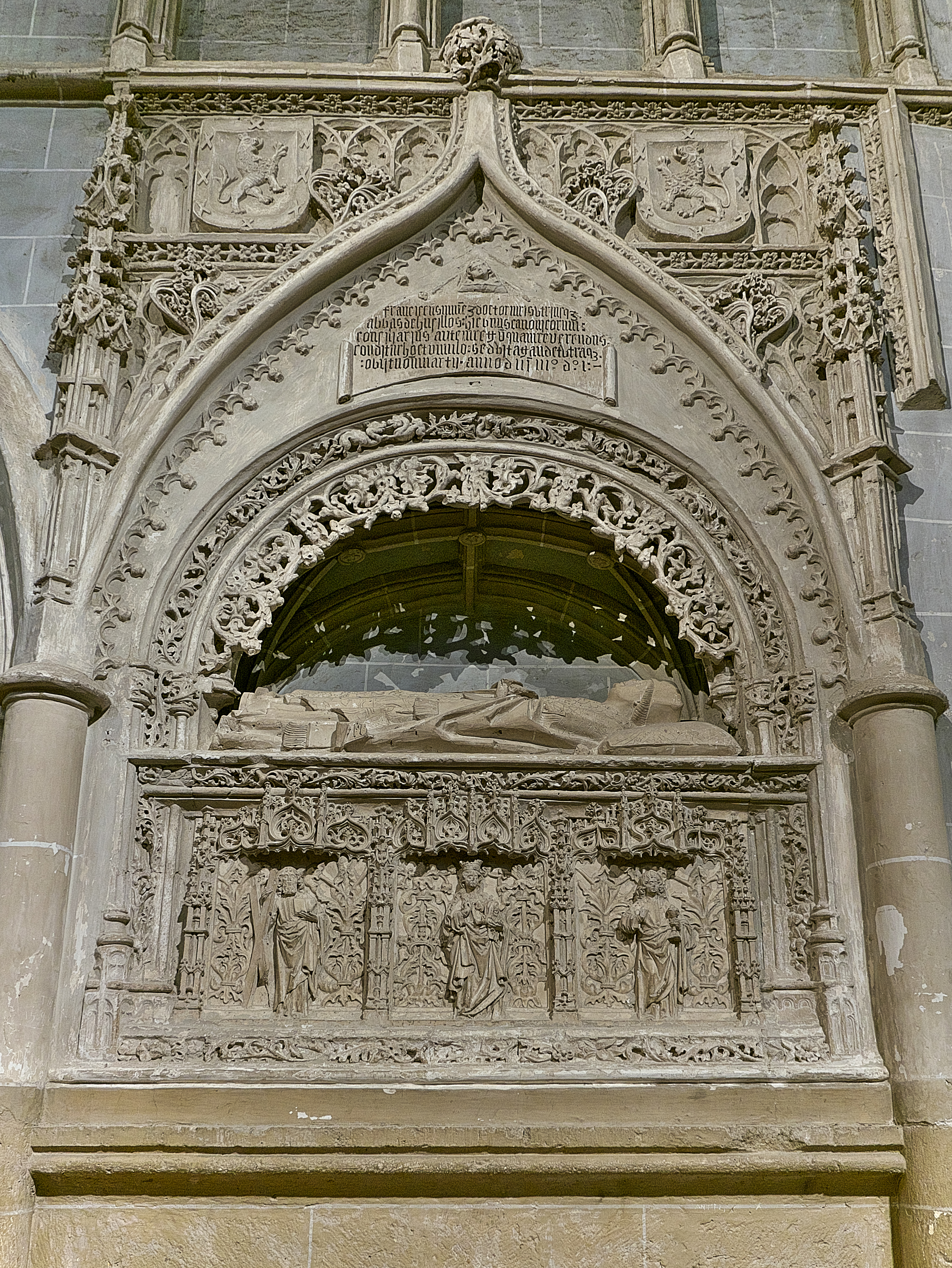 Sepulcro del canónigo Francisco Núñez (†1501), abad de la Colegiata de Santa María de la Dehesa Brava, Husillos.